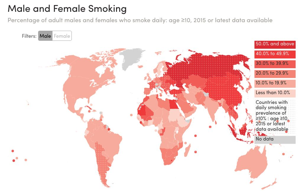 世界の10歳以上の男性喫煙率（2015年）